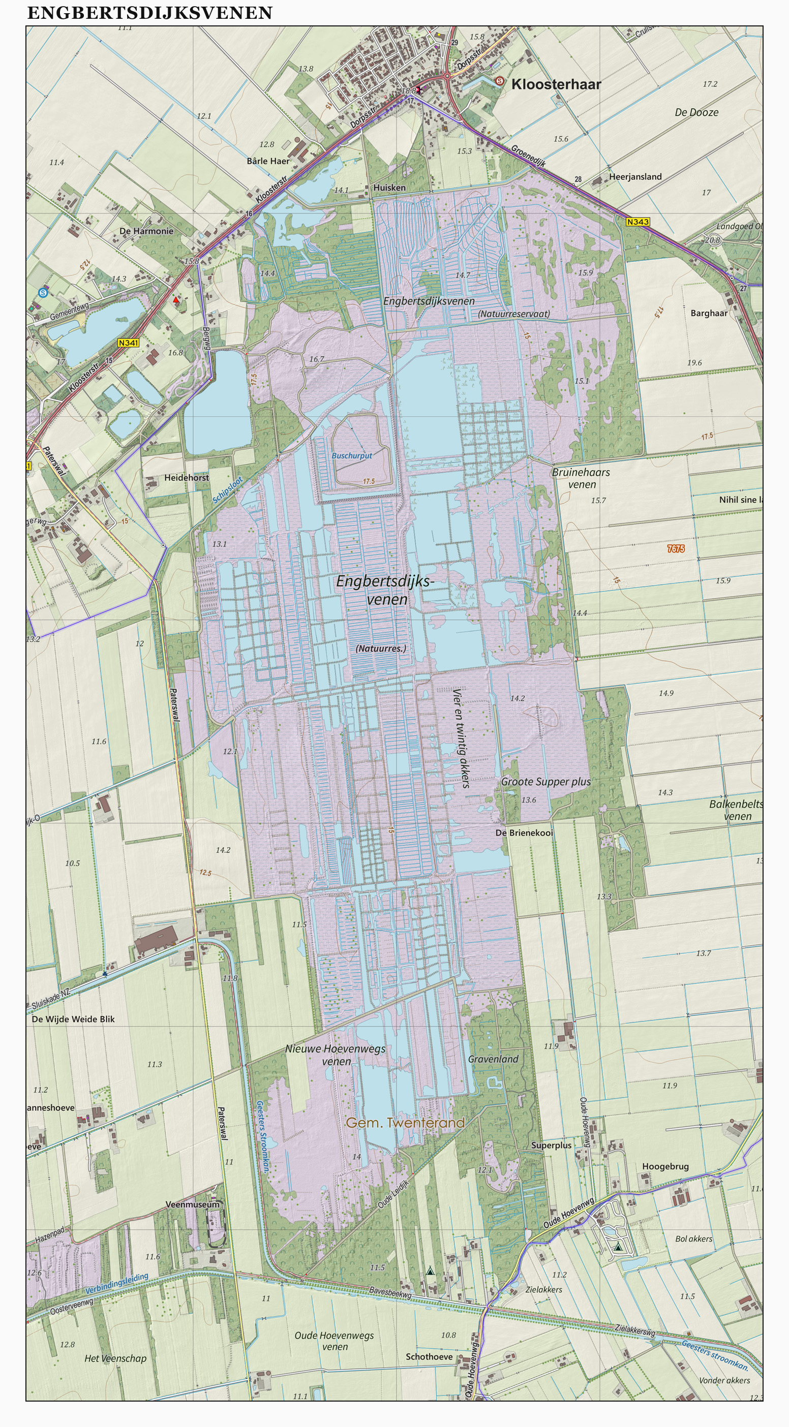 Topografische kaart van Engbertsdijksvenen (natuurgebied). Resolutie: 400 pixels/km. Samengesteld door Jan-Willem van Aalst op basis van de GML open geodata van de BRT/Top10NL (basisregistratie Topografie, Kadaster), vrijgegeven door Kadaster onder de Creative Commons BY licentie. Additionele gegevens uit BAG uit de Open Street Map en uit de Risicokaart. Zie ook de Legenda.